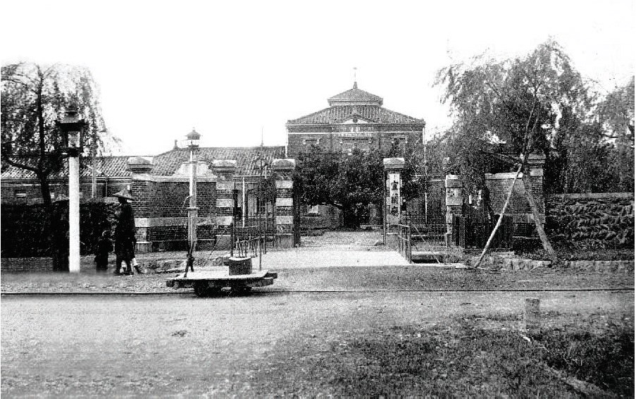 中文（台灣）: 日本於1906年建宜蘭廳署，攝於1915年，建築類似「帝冠式」，圍牆前曾有輕便車往來。其後行政組織多次變革，1950年改稱宜蘭縣政府。至1997年南遷止，作為行政中樞，歷時91年。